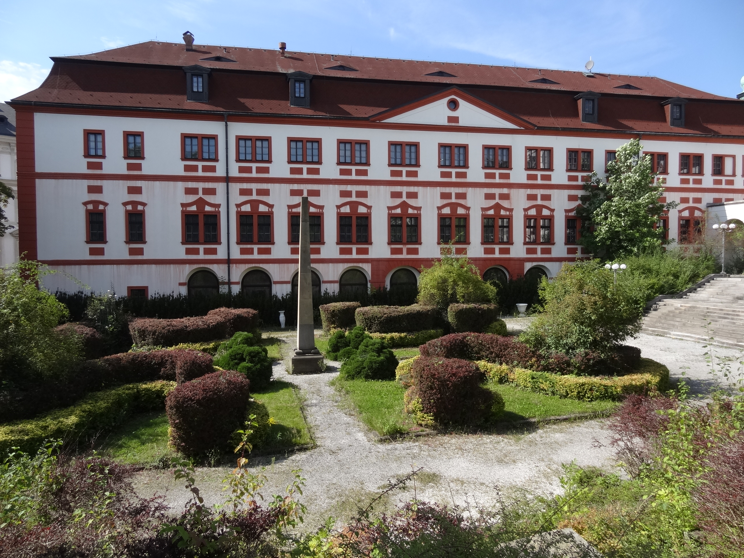 Zámek Liberec, Felberova 1/2, Felberova 85/2b, 61/2a, Gutenbergova 61/2a, Kristiánov, Liberec.